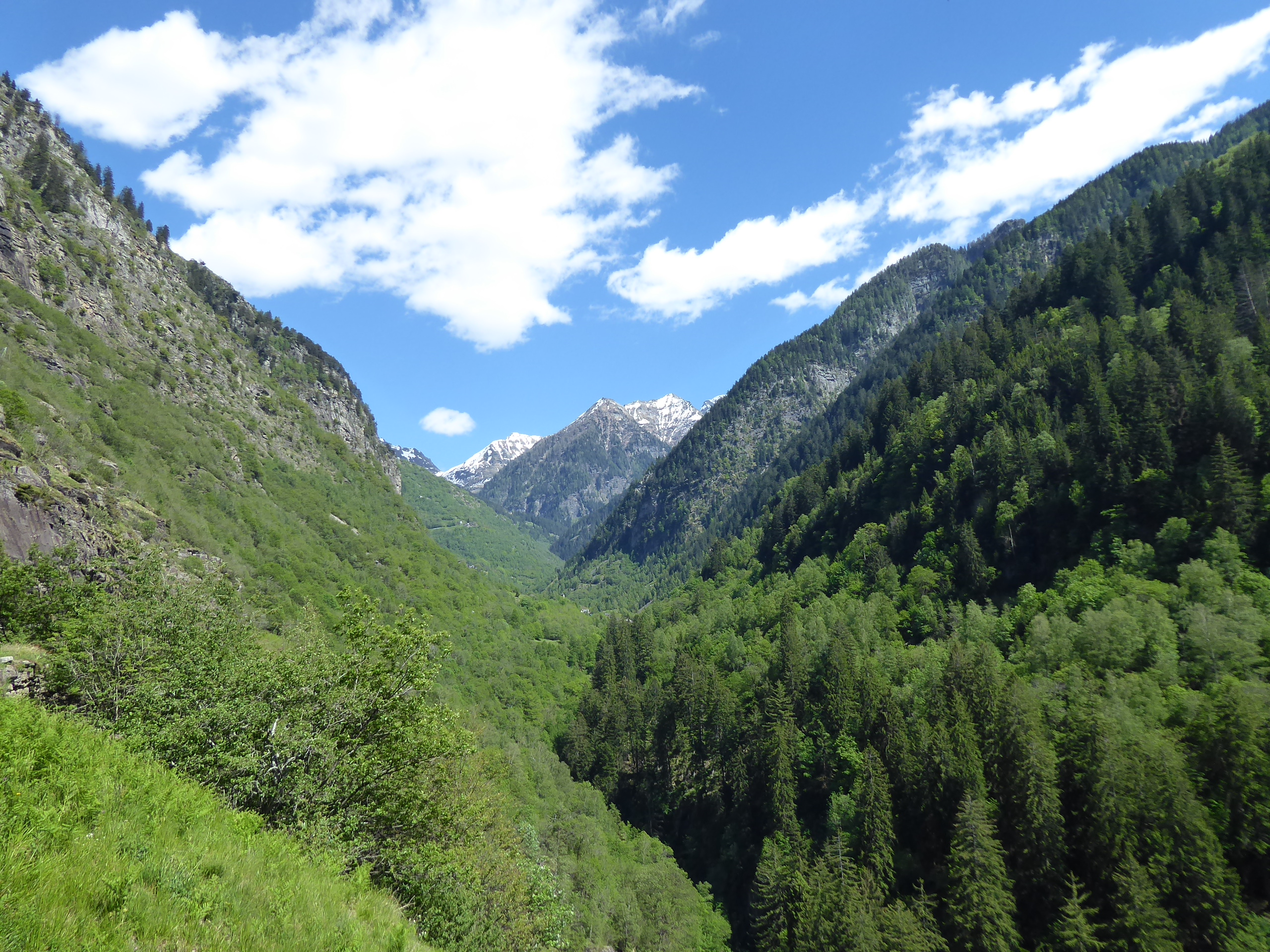 Blick ins Valle Pontirone oberhalb von Biasca im Tessin